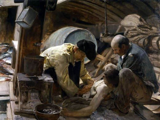 ¡Aún dicen que el pescado es caro! Óleo sobre lienzo. 151,5 x 204 cm. Museo del Prado (Madrid, España)